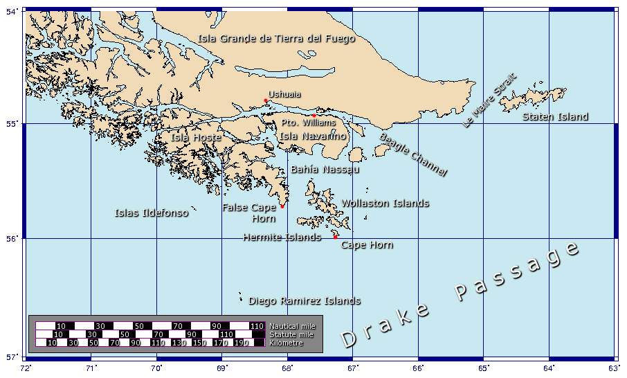 Detalle de las islas cerca del Cabo de Hornos A map showing the location of Cape Horn, including part of the Drake Passage. Generated using GMT.